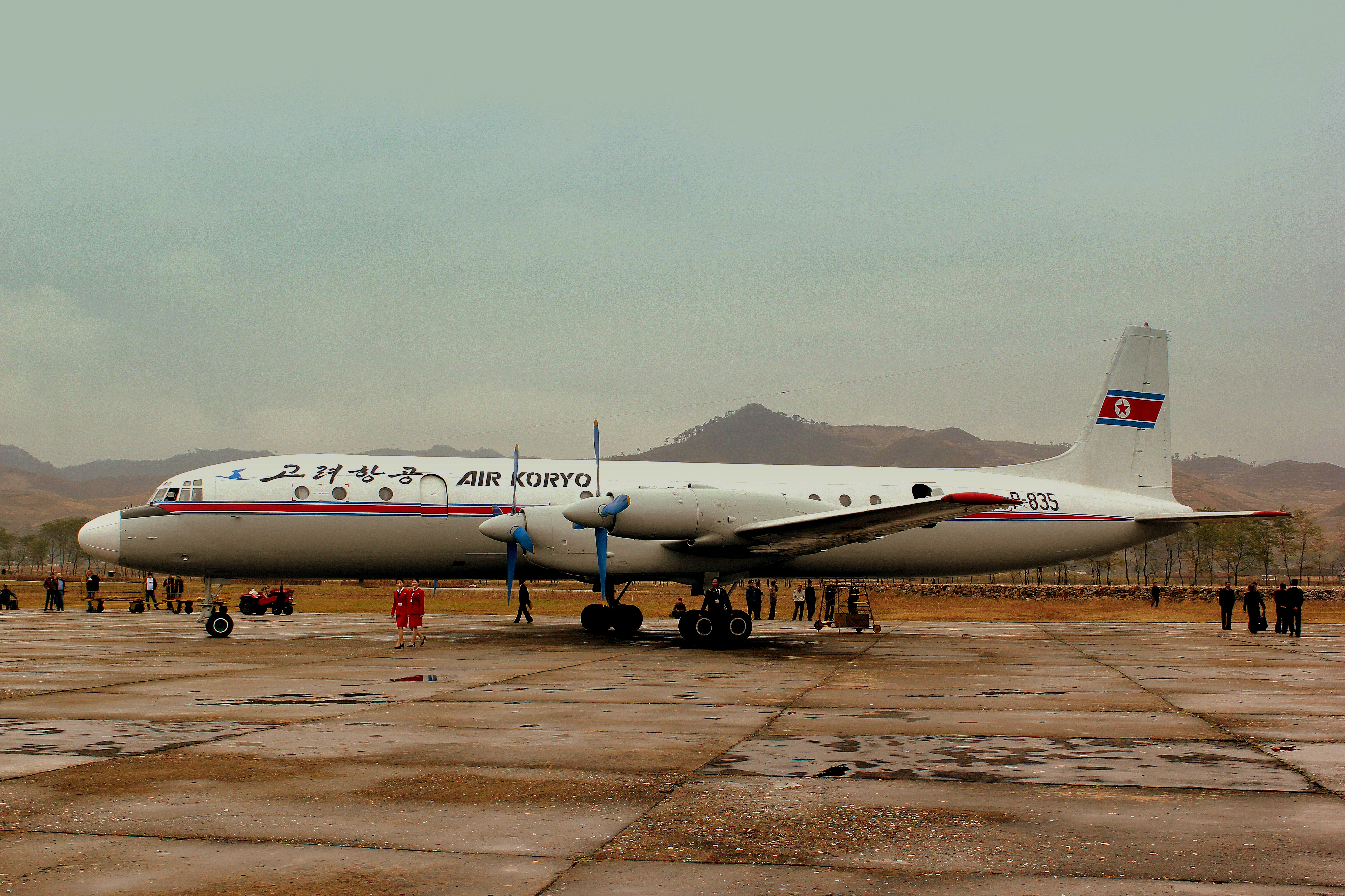 AIR KORYO IL18 P835 AT ORANG MOUNT CHILBO AIRPORT DPR KOREA AFTER OPERATING FLIGHT JS5205 FROM PYONGYANG SUNAN AIRPORT OCT 2012